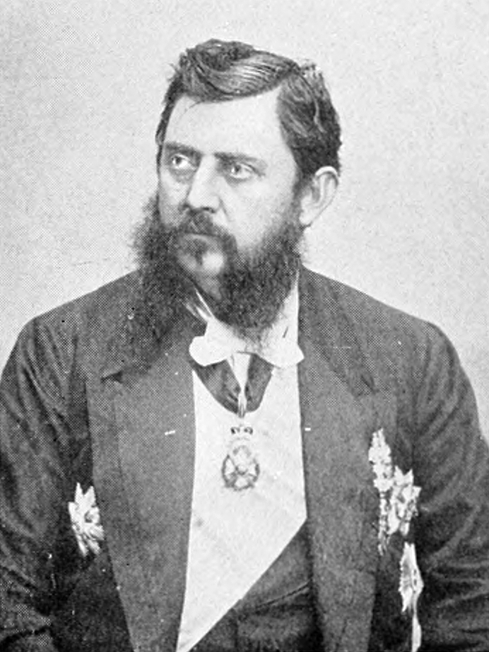 Vladan Dordevic